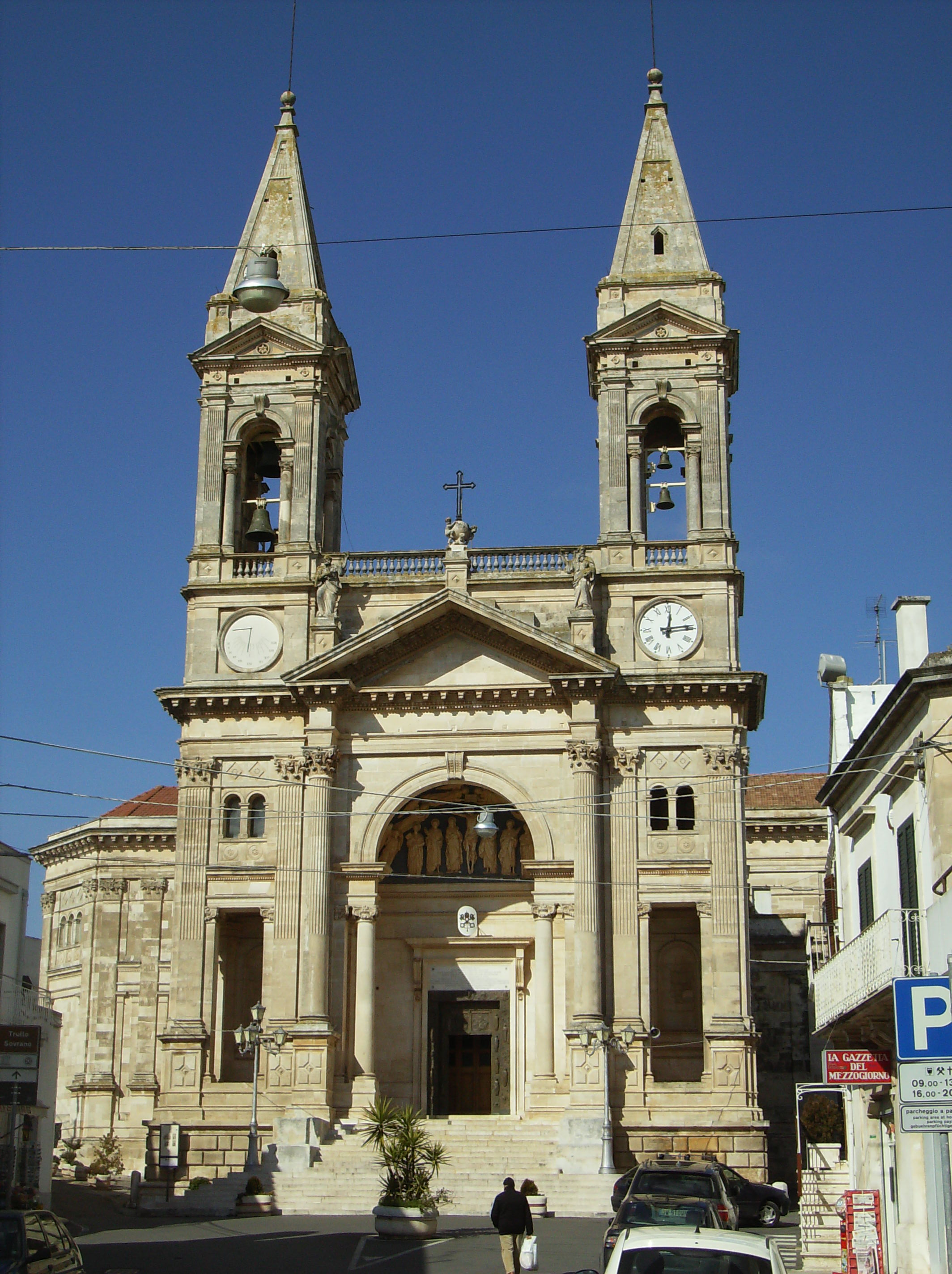 Alberobello - Italie - Basiclique des SS Cosma et Damiano